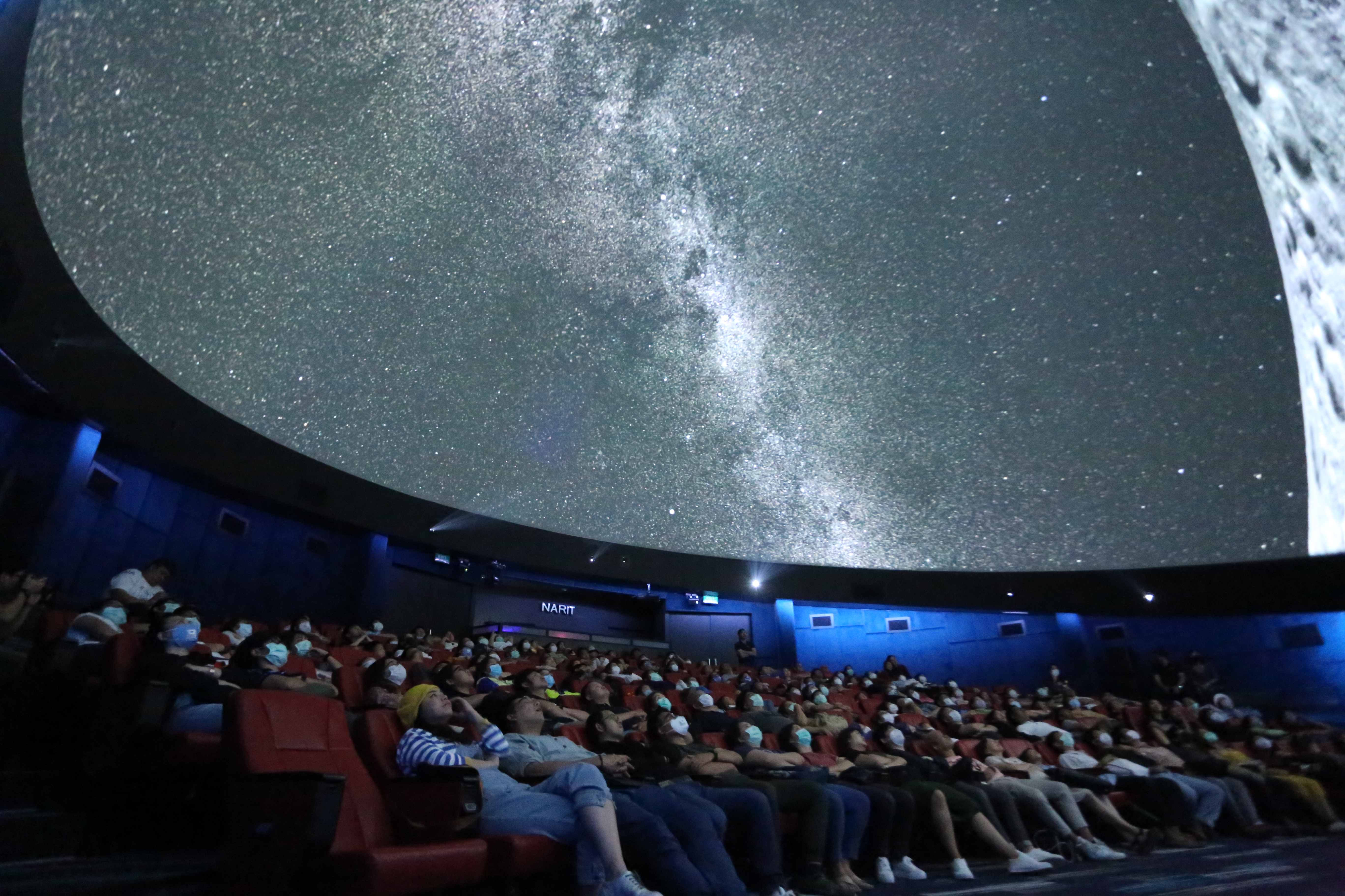 ท้องฟ้าจำลองฟูลโดมดิจิทัล ณ อุทยานดาราศาสตร์สิรินธร จ.เชียงใหม่ ความจุ 160 ที่นั่ง